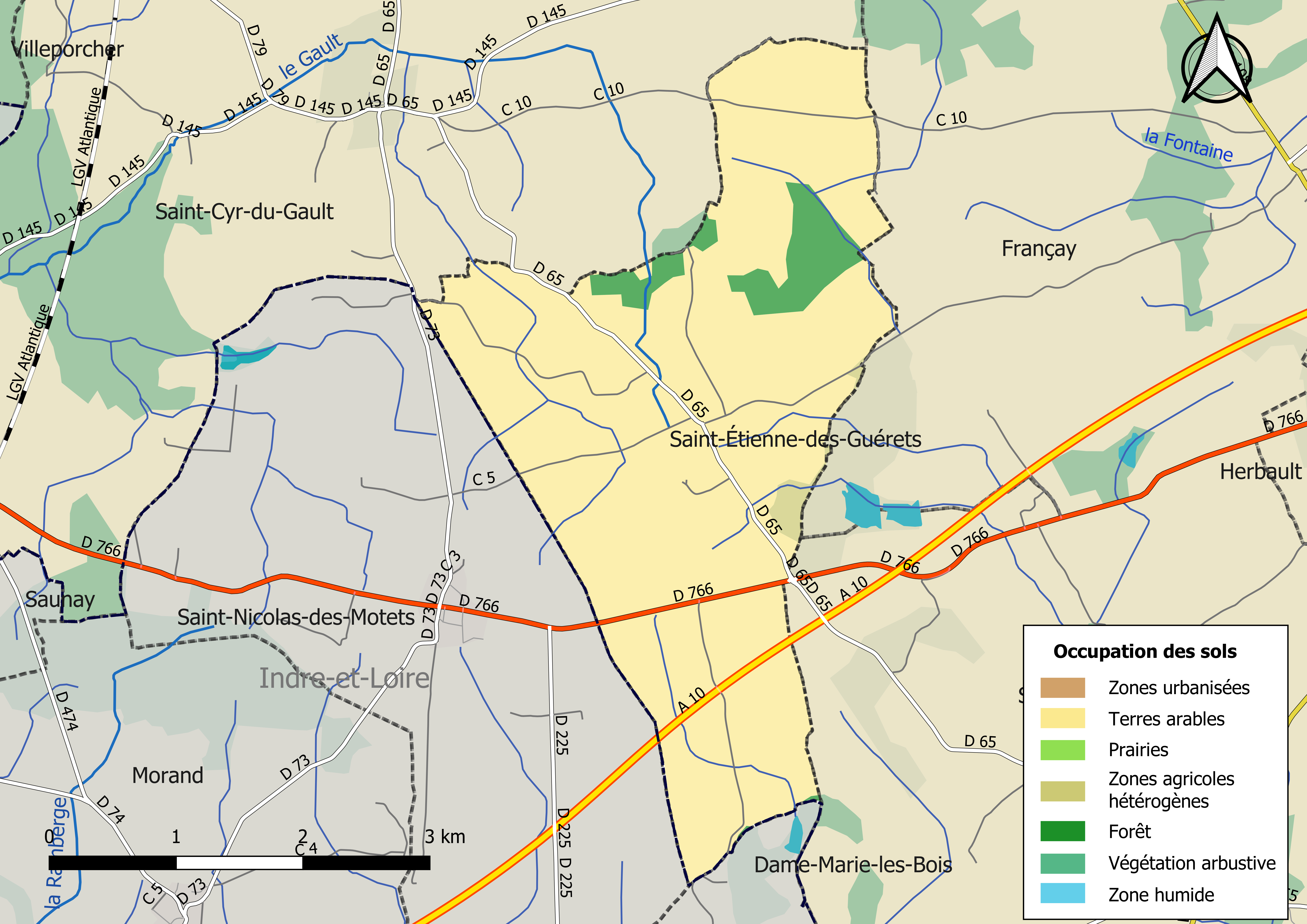 Carte des infrastructures et de l’occupation des sols en 2018 de la commune de Saint-Étienne-des-Guérets (France).